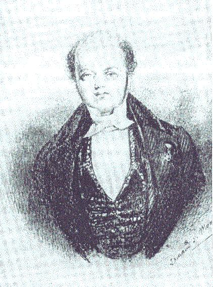 Benjamin Valz, photo personnelle